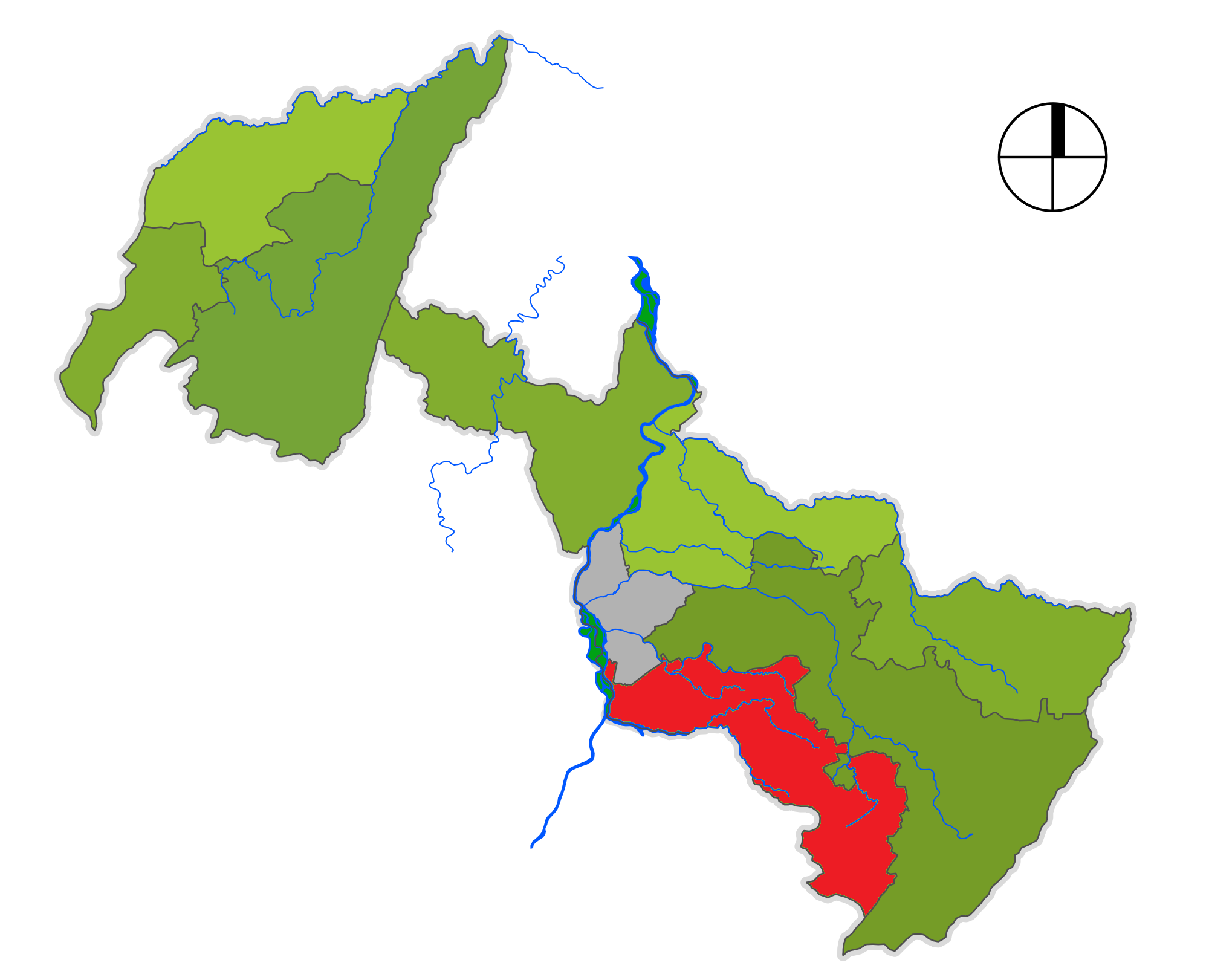 Corregimiento de Neiva El Caguán, departamento del Huila, Colombia.